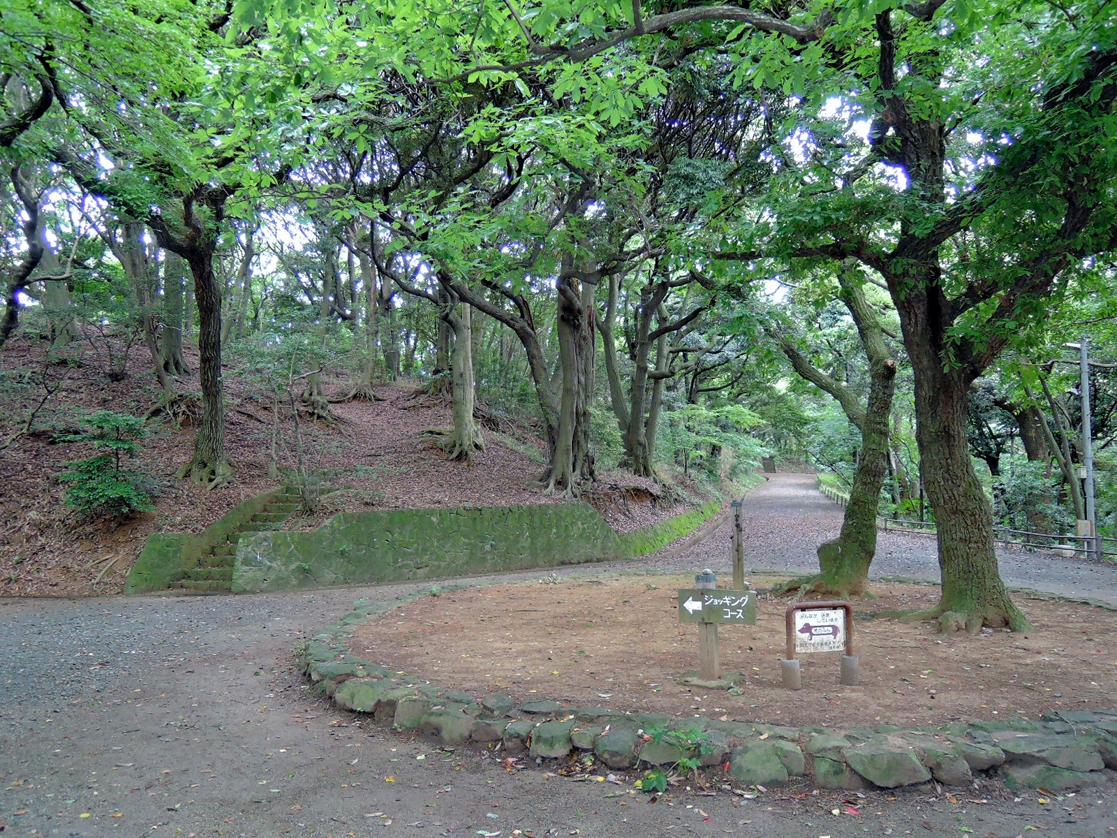 福岡市南公園